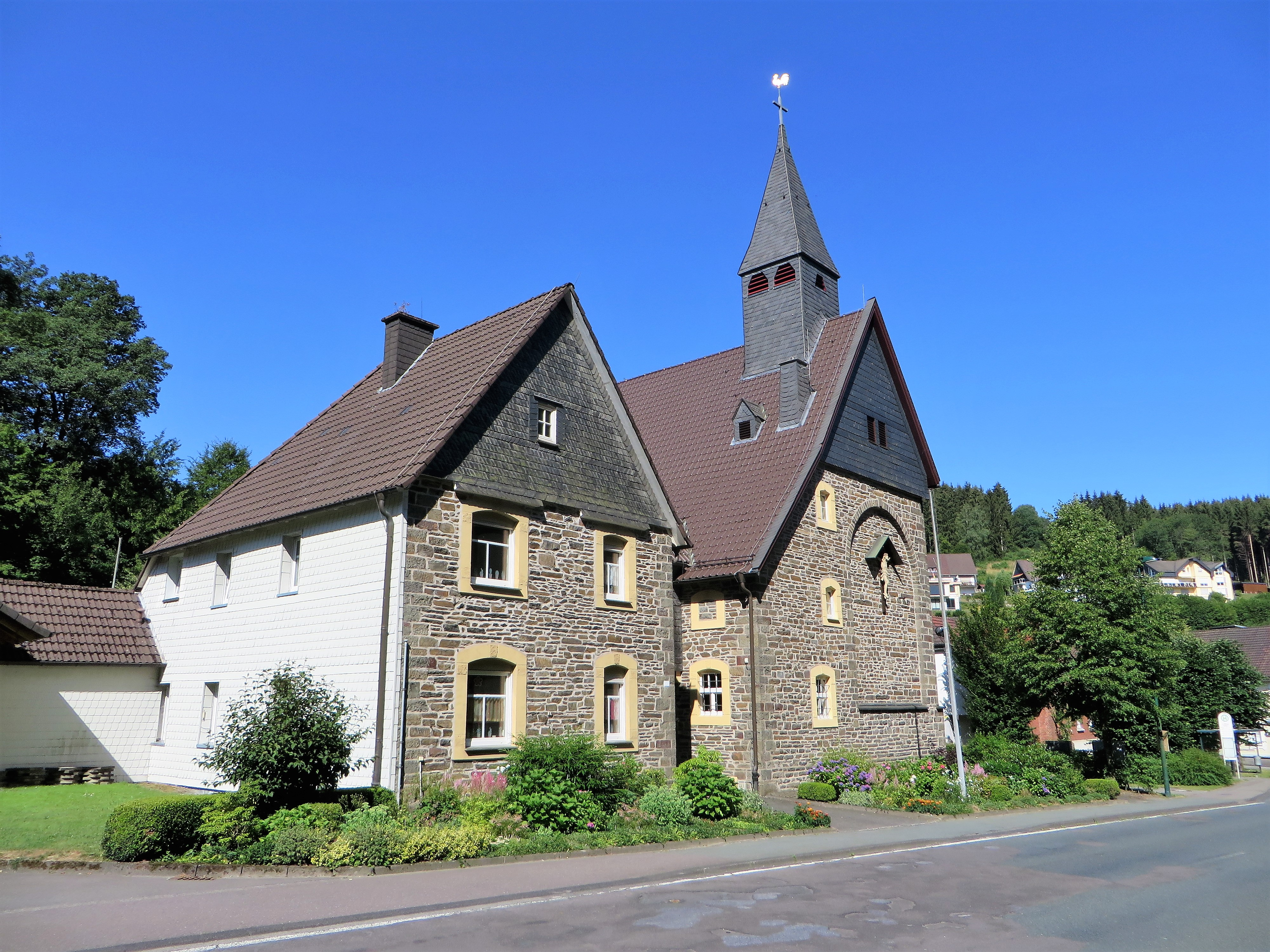 Katholische Kirche St. Jakobus der Ältere im Attendorner Ortsteil Lichtringhausen, Plettenberger Straße. Erbaut auf Veranlassung des Kölner Domkapitulars Prof. Dr. Alexander Schnütgen. Einweihung im Jahre 1911. Links Pfarrhaus und Pfarrheim.